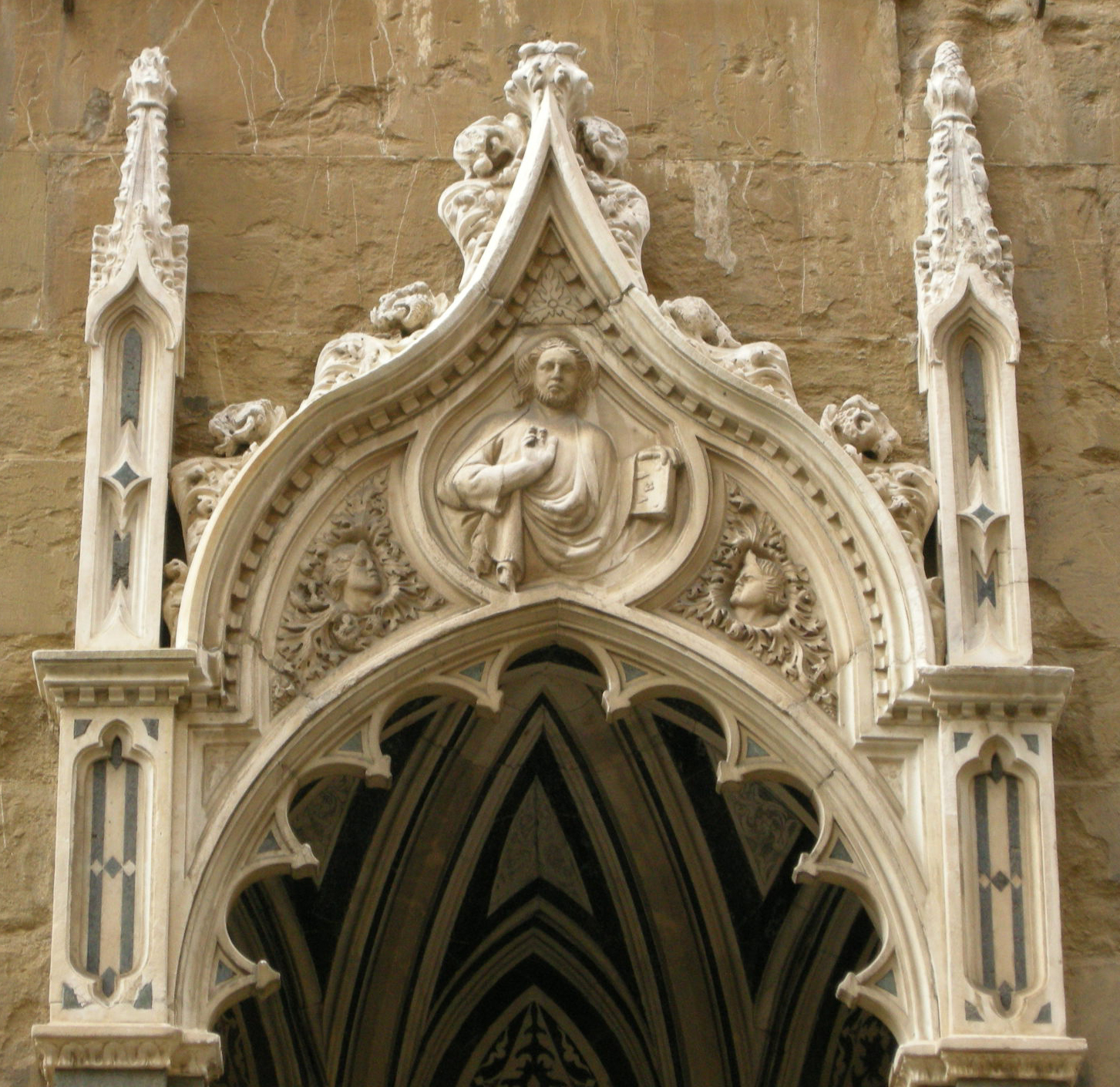 Orsanmichele, tabernacolo dell'arte dei Linaioli e Rigattieri